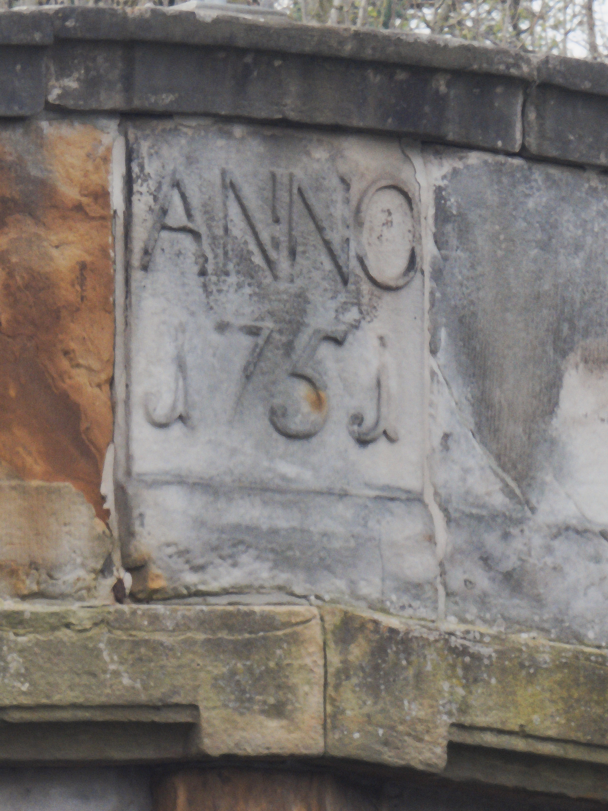 Inschrift "ANNO J75J" an der Calenberger Brücke über die Leine in Schulenburg. Die Inschrift wurde angeblich vom Volksmund ("A[lpha ] N[omen] N[escio] O[mega], J[unger] Z[igeuner] 5 J[ahre alt]") als Teil einer Legende interpretiert.